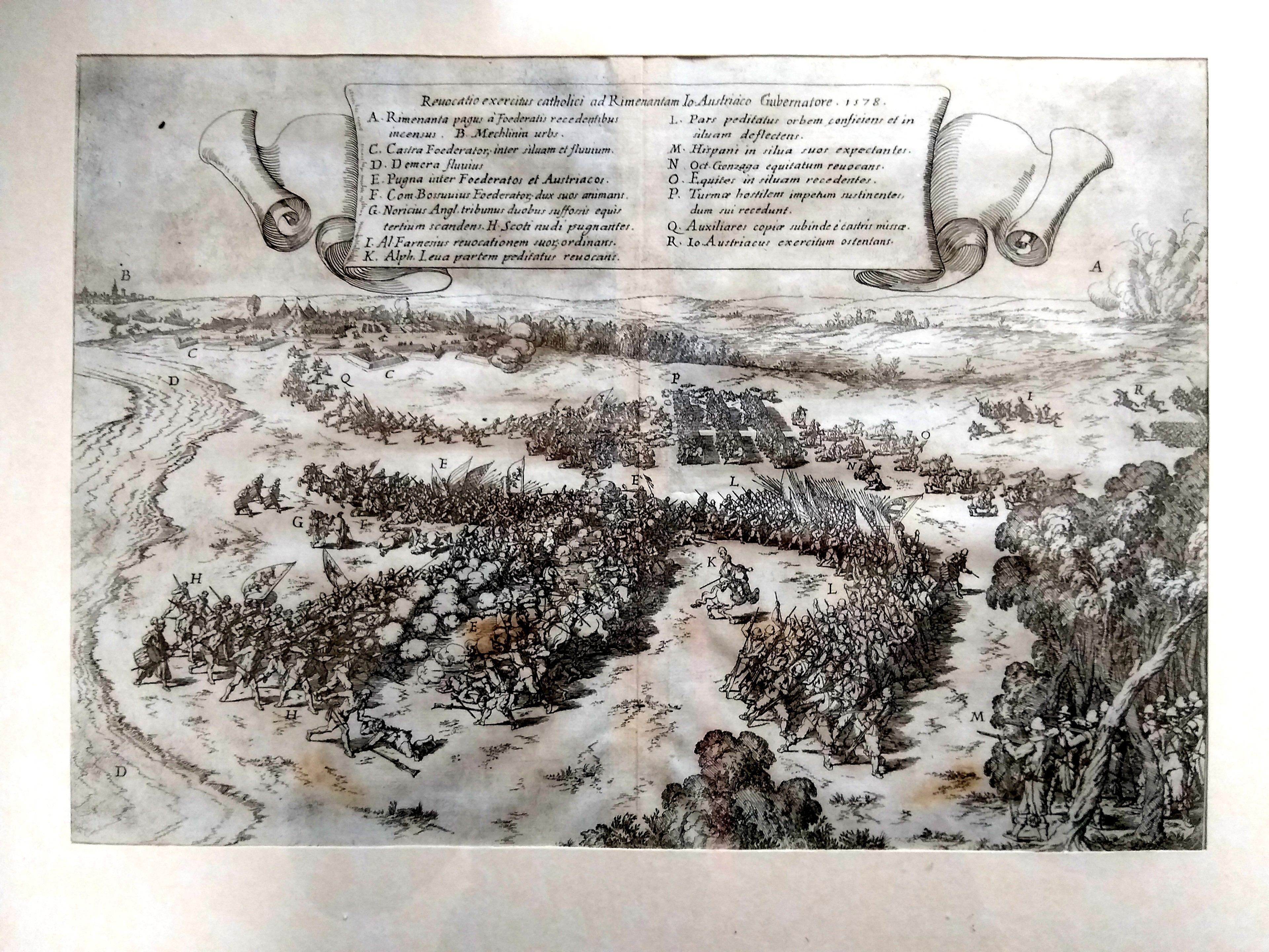 Kopergravure van de Slag bij Rijmenam door Johann Wilhelm Baur, ca. 1645